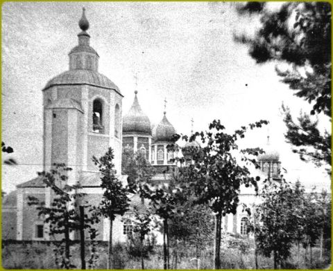 Одрино-Николаевский монастырь. Вид храма. Фотография с фотографии конца 19-го - начала 20-го века.